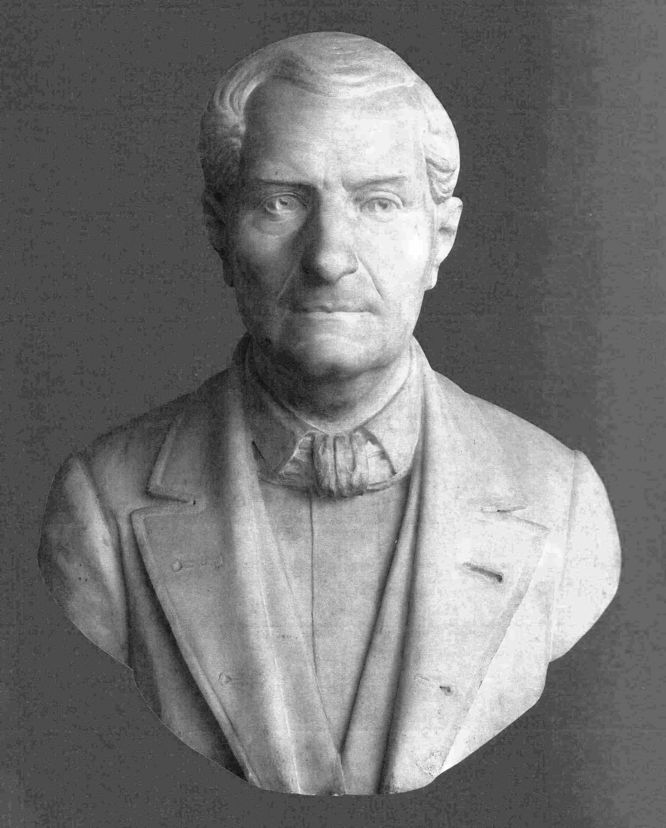 Busto di Amadio Ronchini (1812-1890), storico parmense.